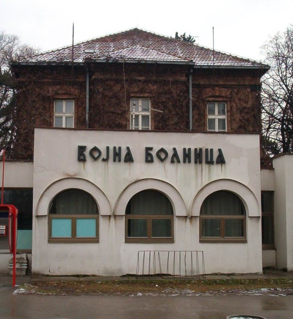 Vojna bolnica Niš